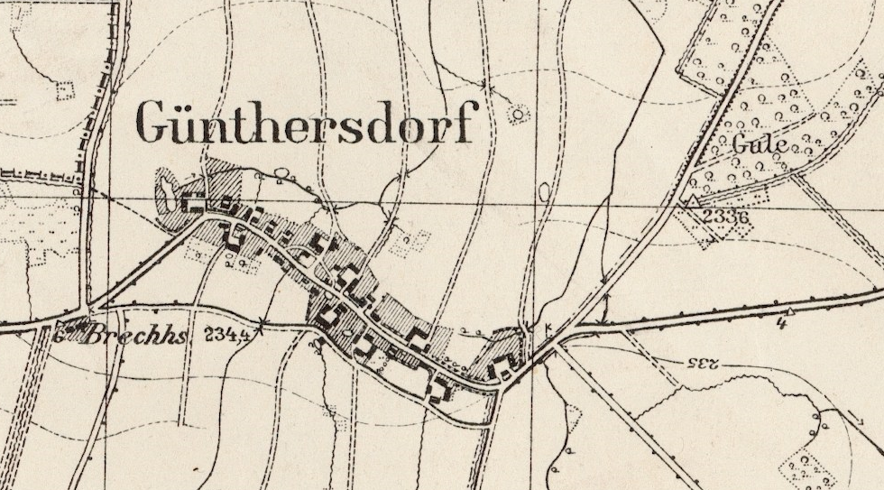 Kartenausschnitt von Günthersdorf, Kreis Schweidnitz aus dem Messtischblatt 5063 von 1936